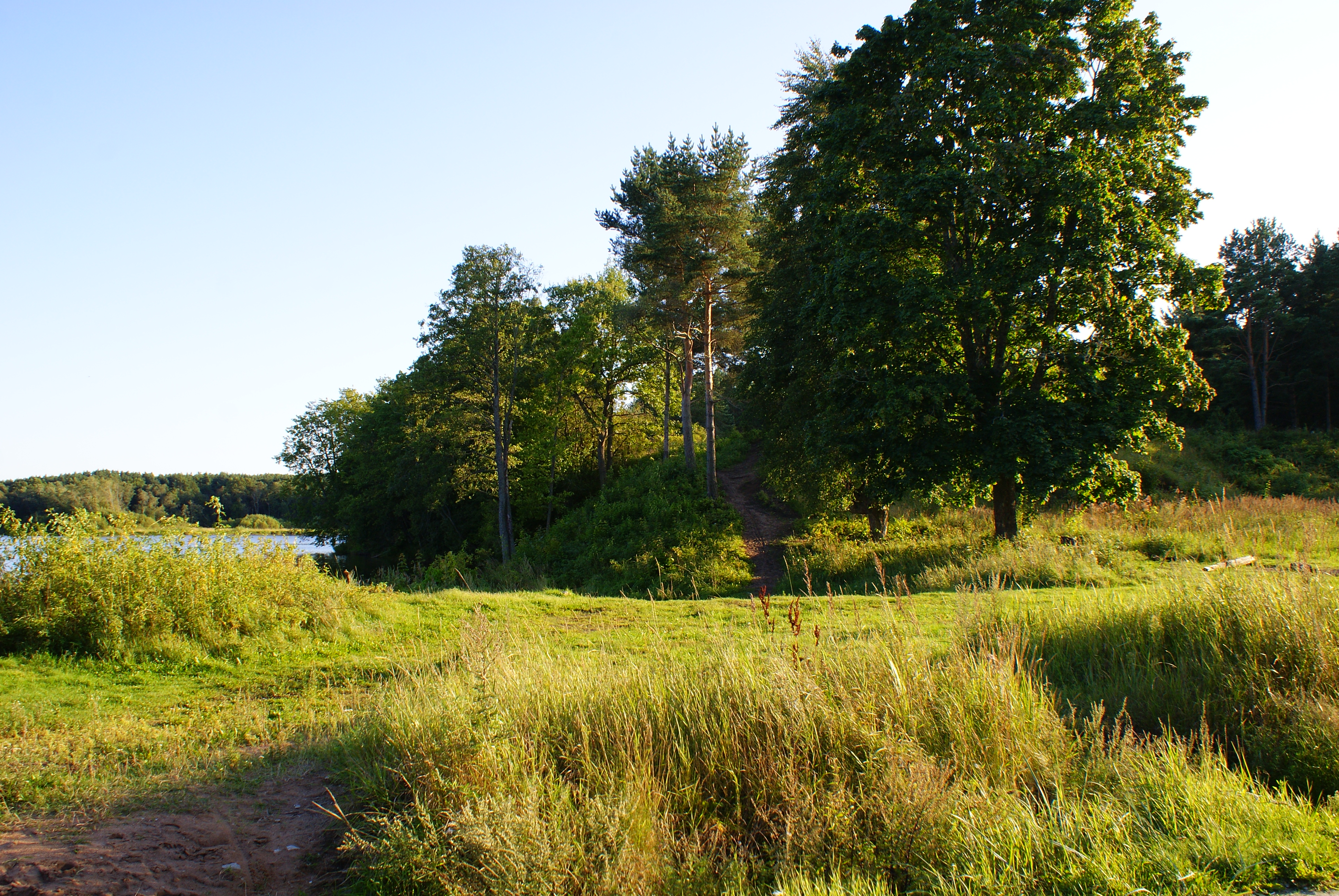 Jägala linnus